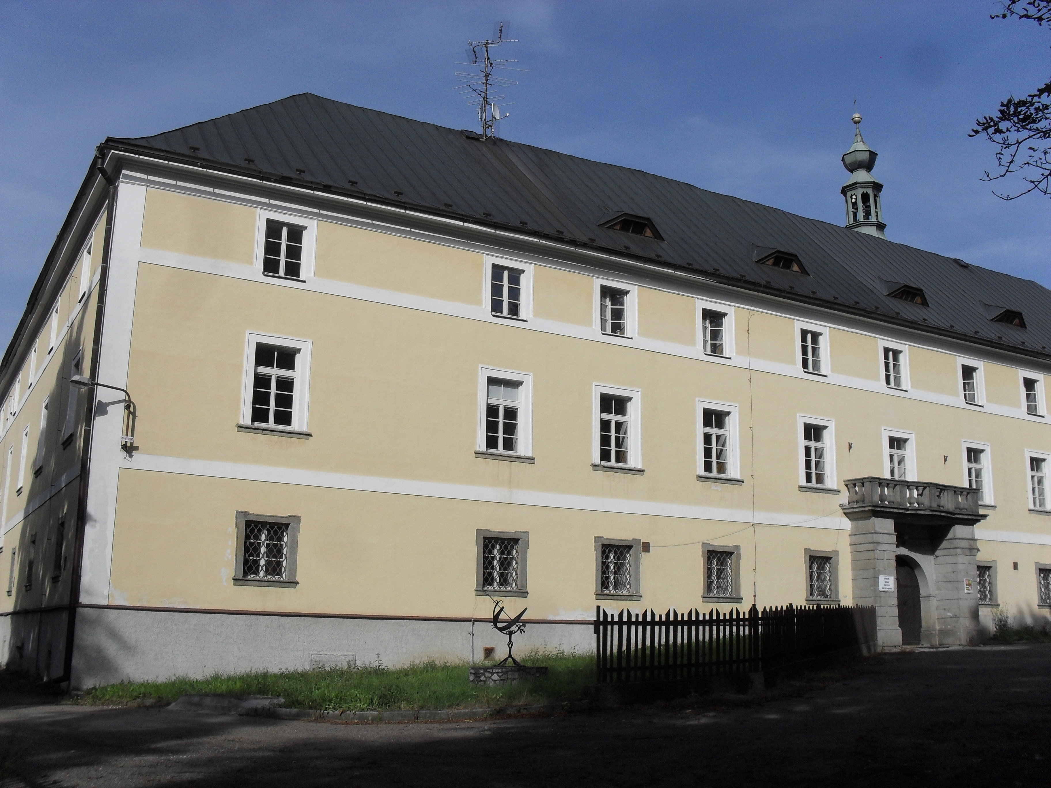 Fotografie pořízena v obci Oselce